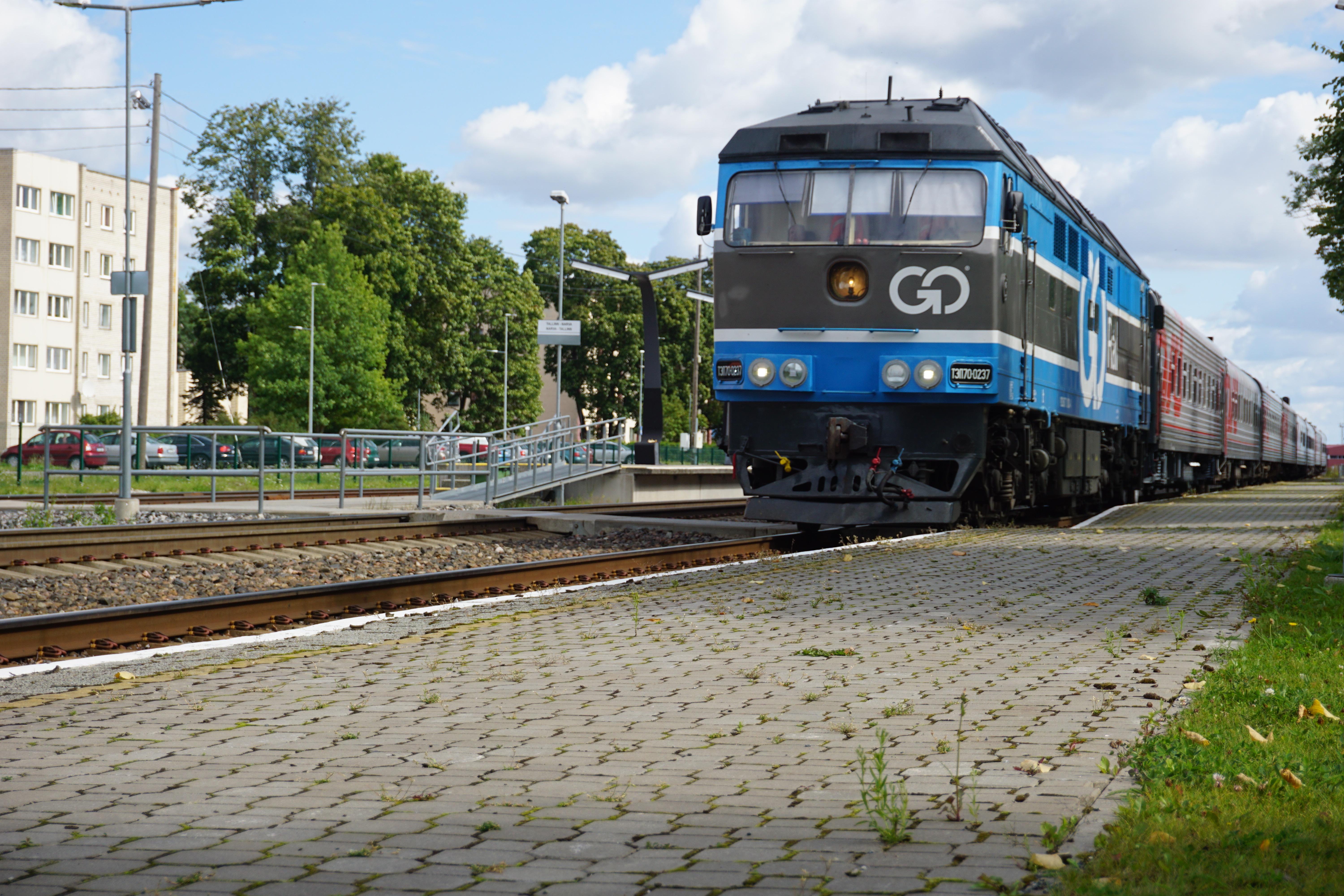 Moskva-Tallinn reisirong lahkumas Tapa jaamast.